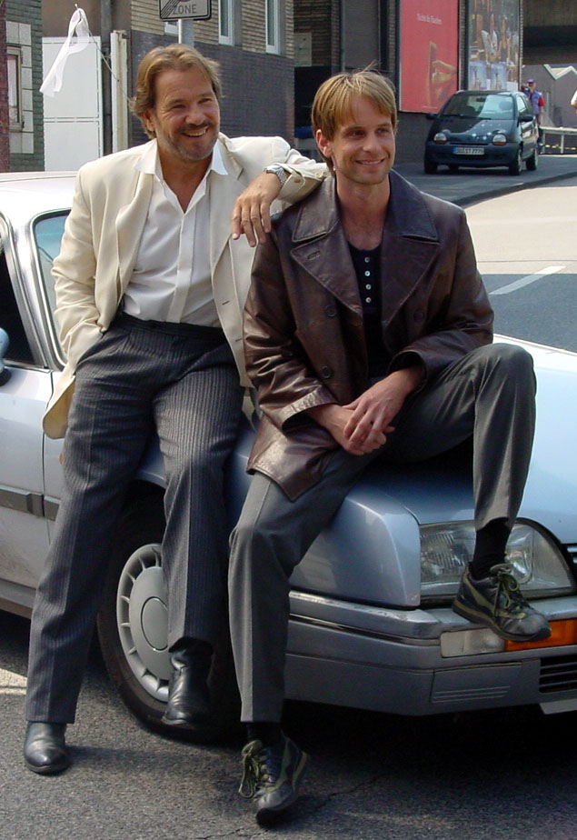 Schimanski (Götz George) auf dem Weg zum Standesamt. Zusammen mit Hauptkommissar Hunger (Julian Weigend) bei Dreharbeiten im Duisburg Innenhafen. Quelle: Fotografiert im Sommer 2001 Fotograf: Harald Schrapers Lizenzstatus: GNU FDL